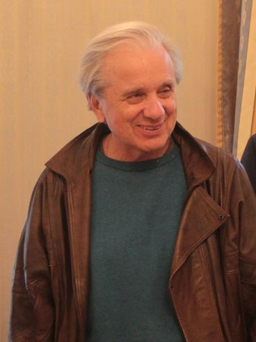 Вручение "Золотого знака" СТД РФ народной артистке СССР Юлии Константиновне Борисовой